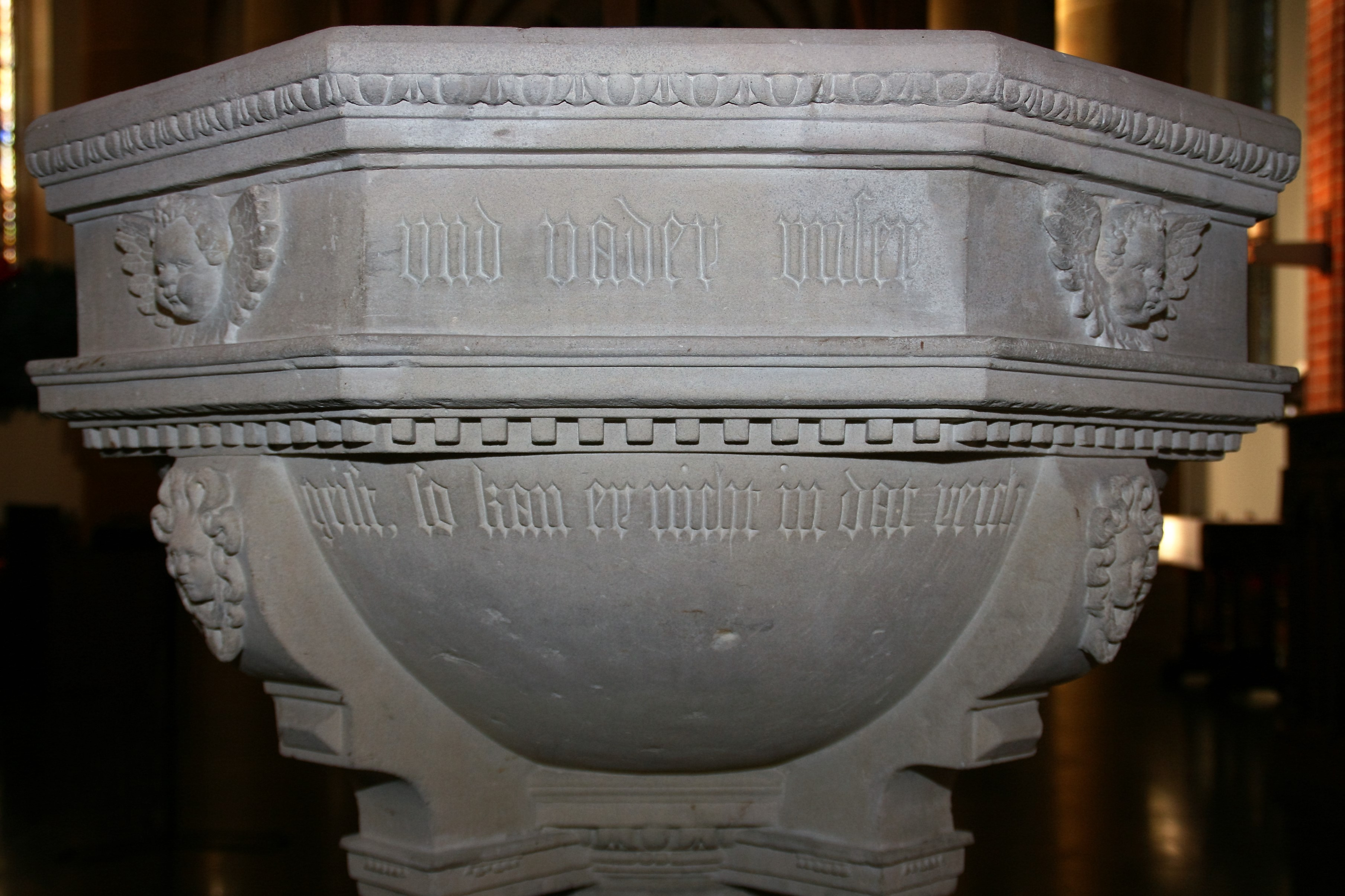 Inschrift des Sendenhorster Taufsteins 3, Standort: St. Laurentiuskirche, Westkirchen.